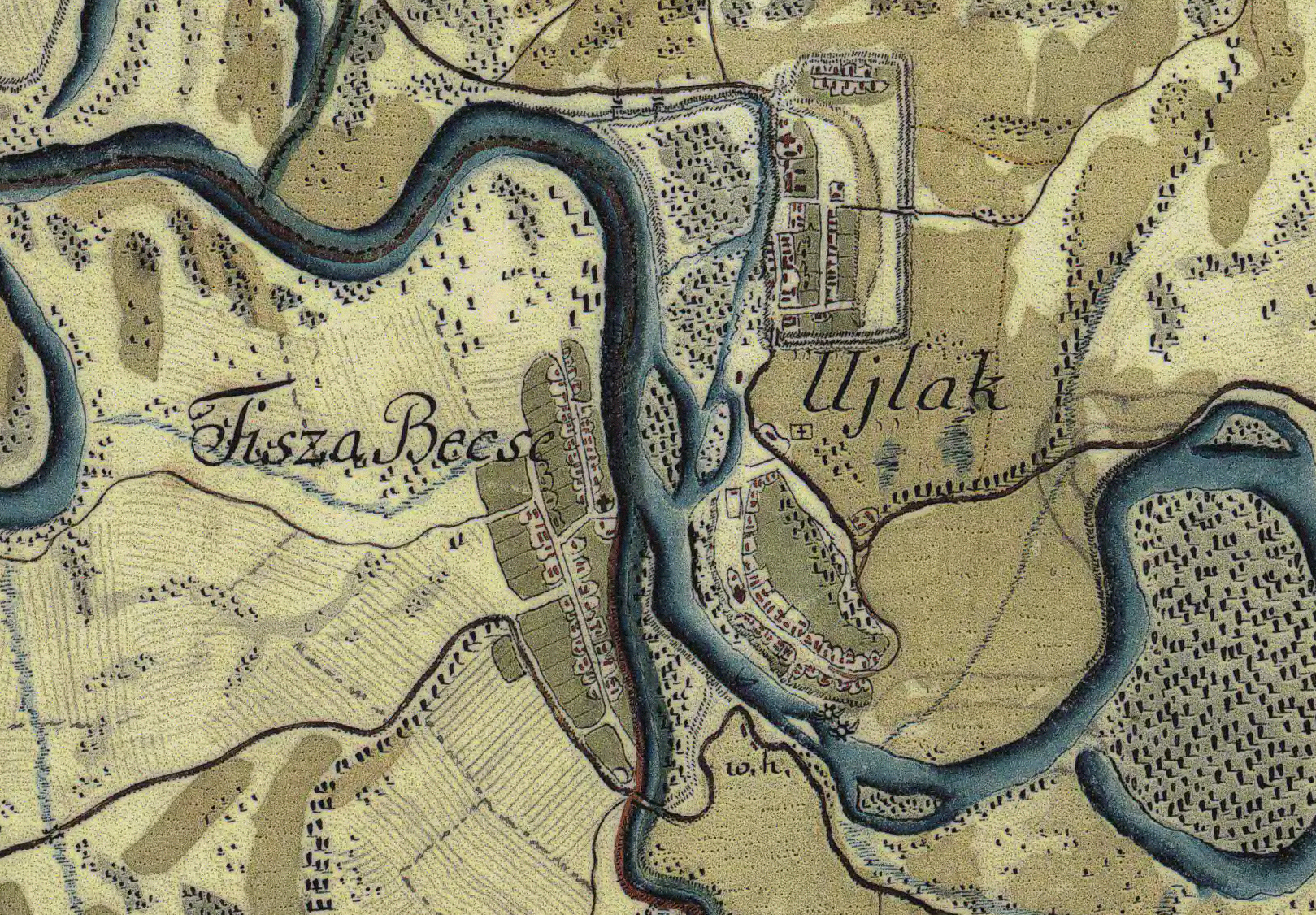 Tiszaújlak 1780–1784 között. Jozefiniánus topográfiai térkép, az eredeti méretarány 1:28800